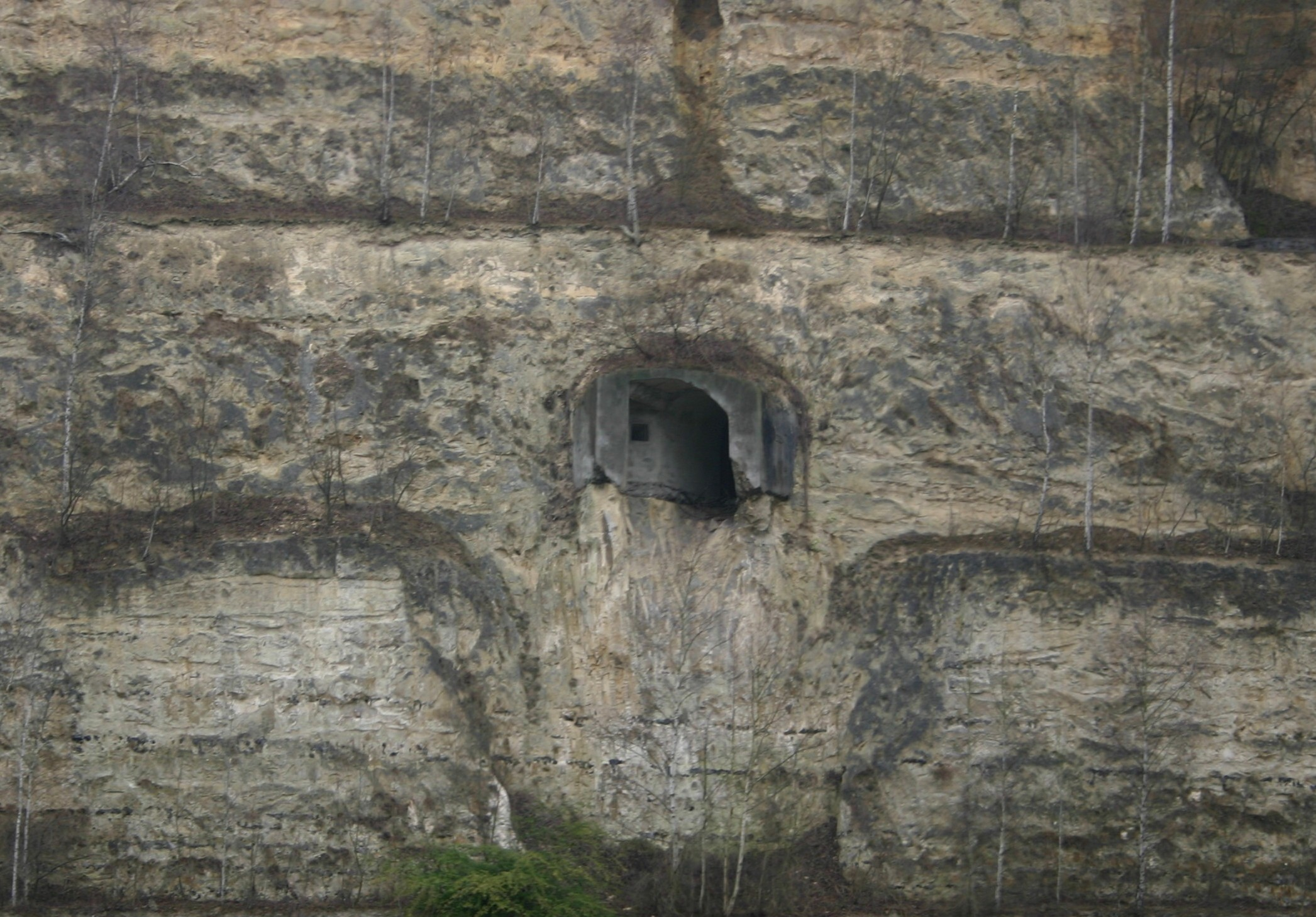 Schéissschachte vum Fort Eben Emael.